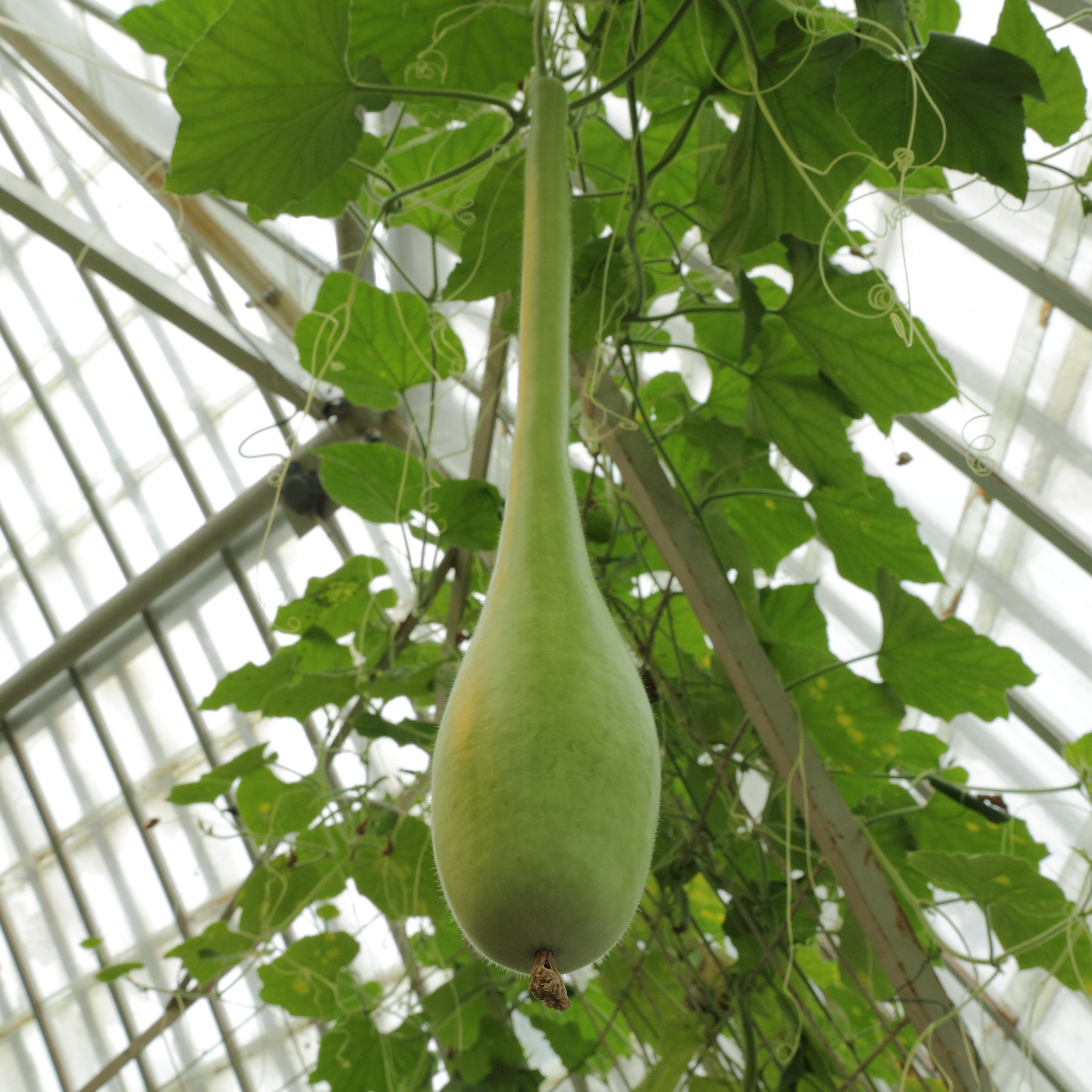 Lagenaria siceraria i Bergianska trädgården.